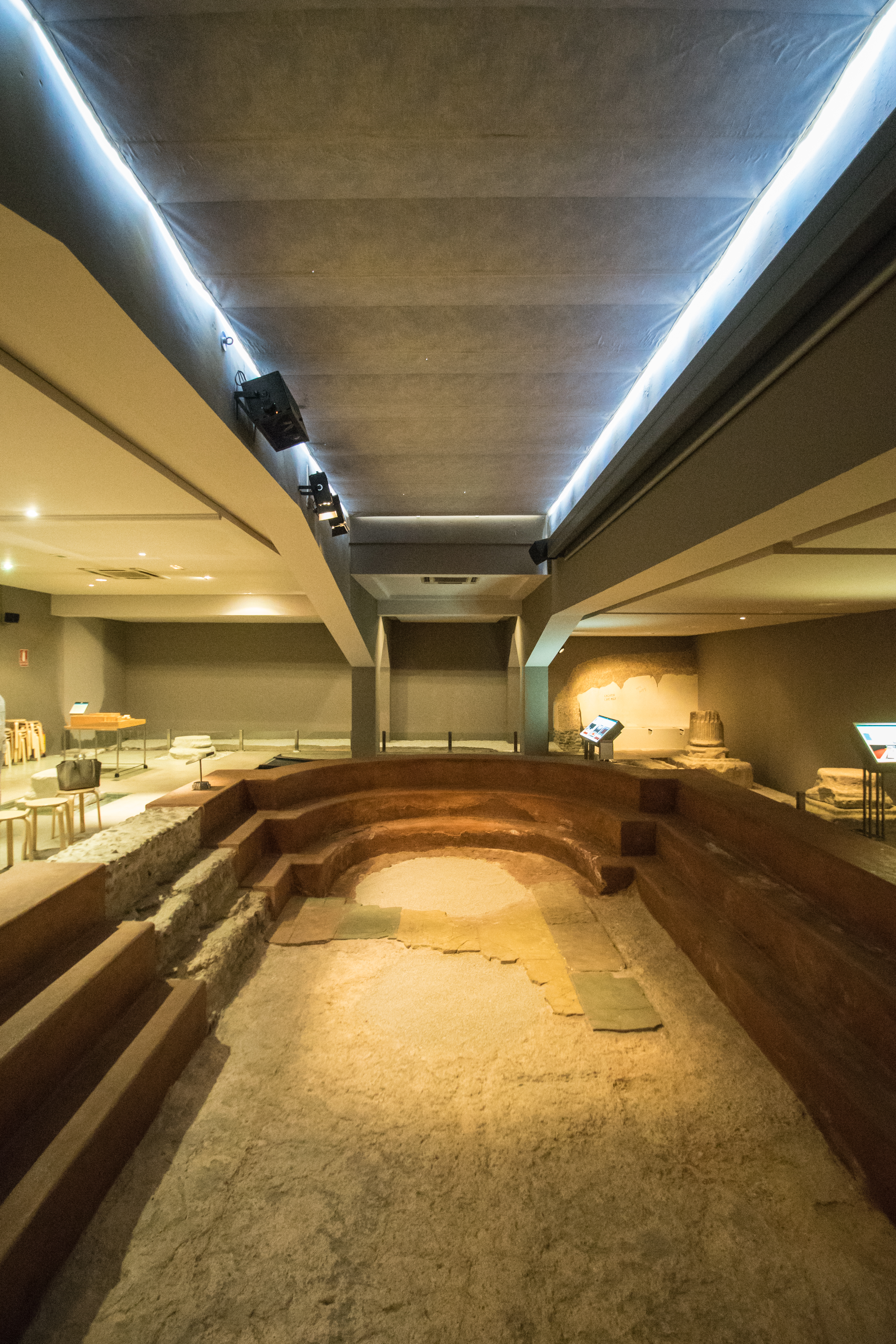 Museo de las Termas de Zaragoza